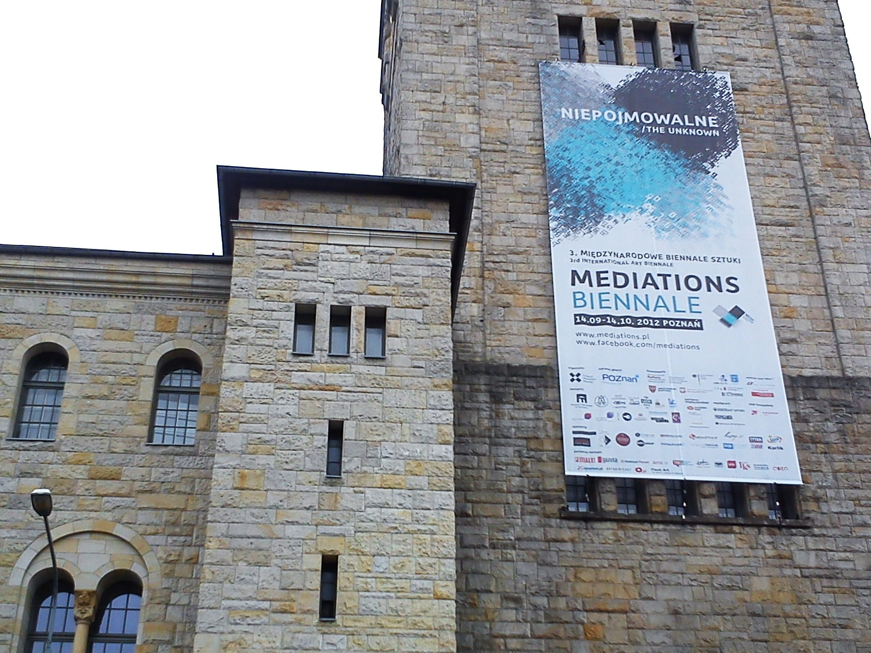 Mediations Biennale 2012, Poznan.